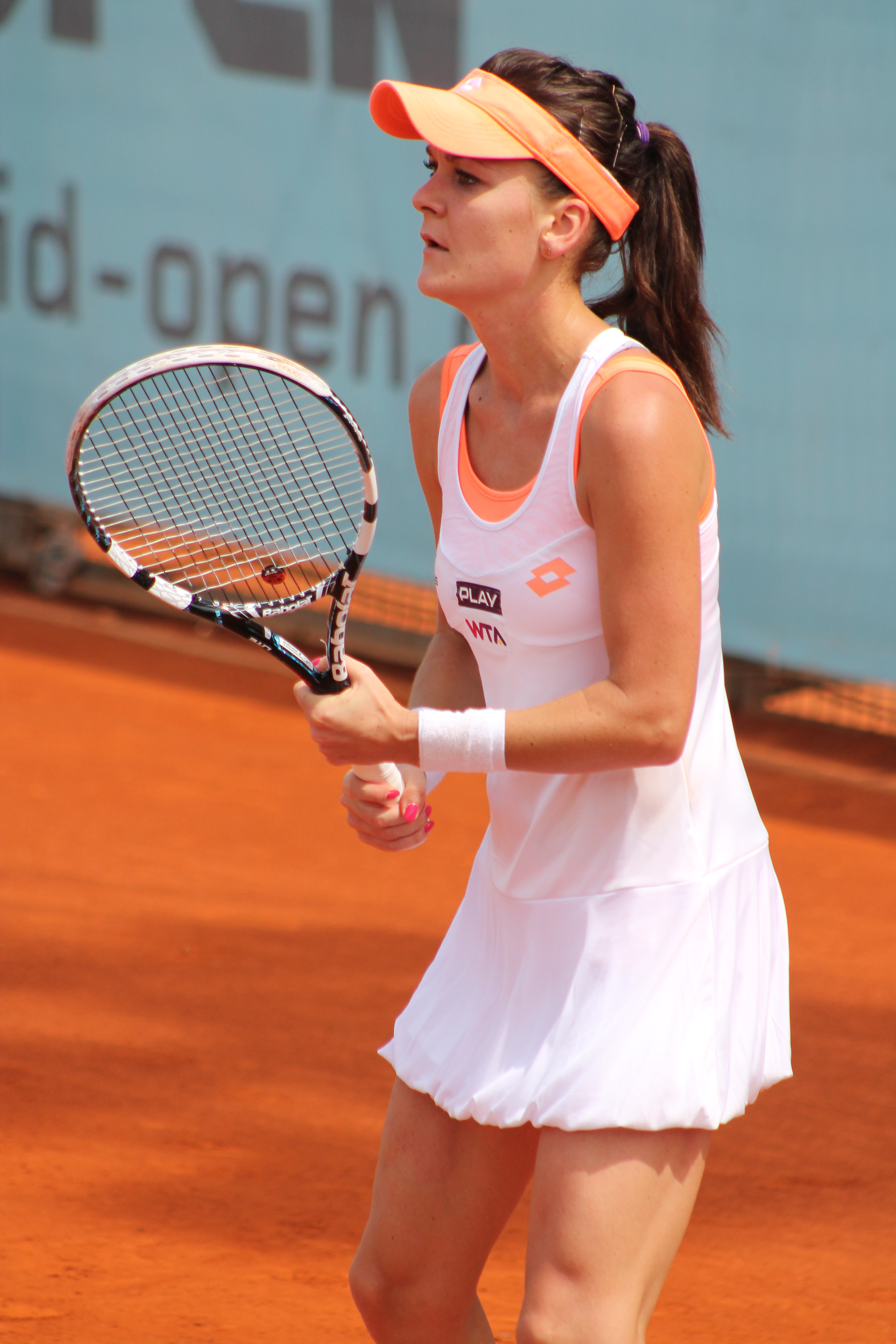 Radwanska A. MA14 (22) - Copy